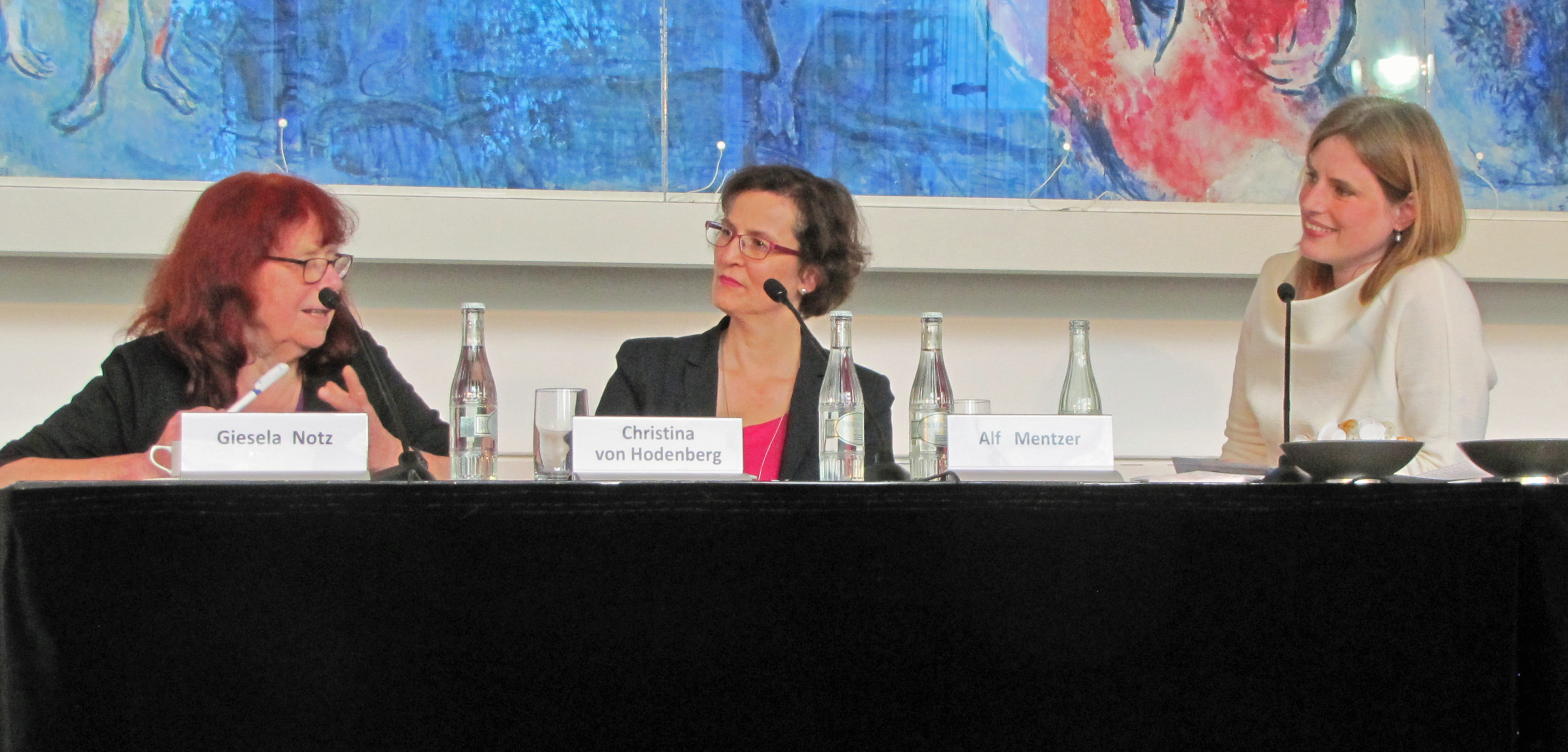 Gisela Notz, Christina von Hodenberg und Insa Wilke, bei den 46. Römerberggesprächen, Thema:1968-2018: What is left?' Errungenschaft und Bürde eines politischen Aufbruchs", im April 2018 im Chagall-Saal der Städtischen Bühnen in Frankfurt am Main.